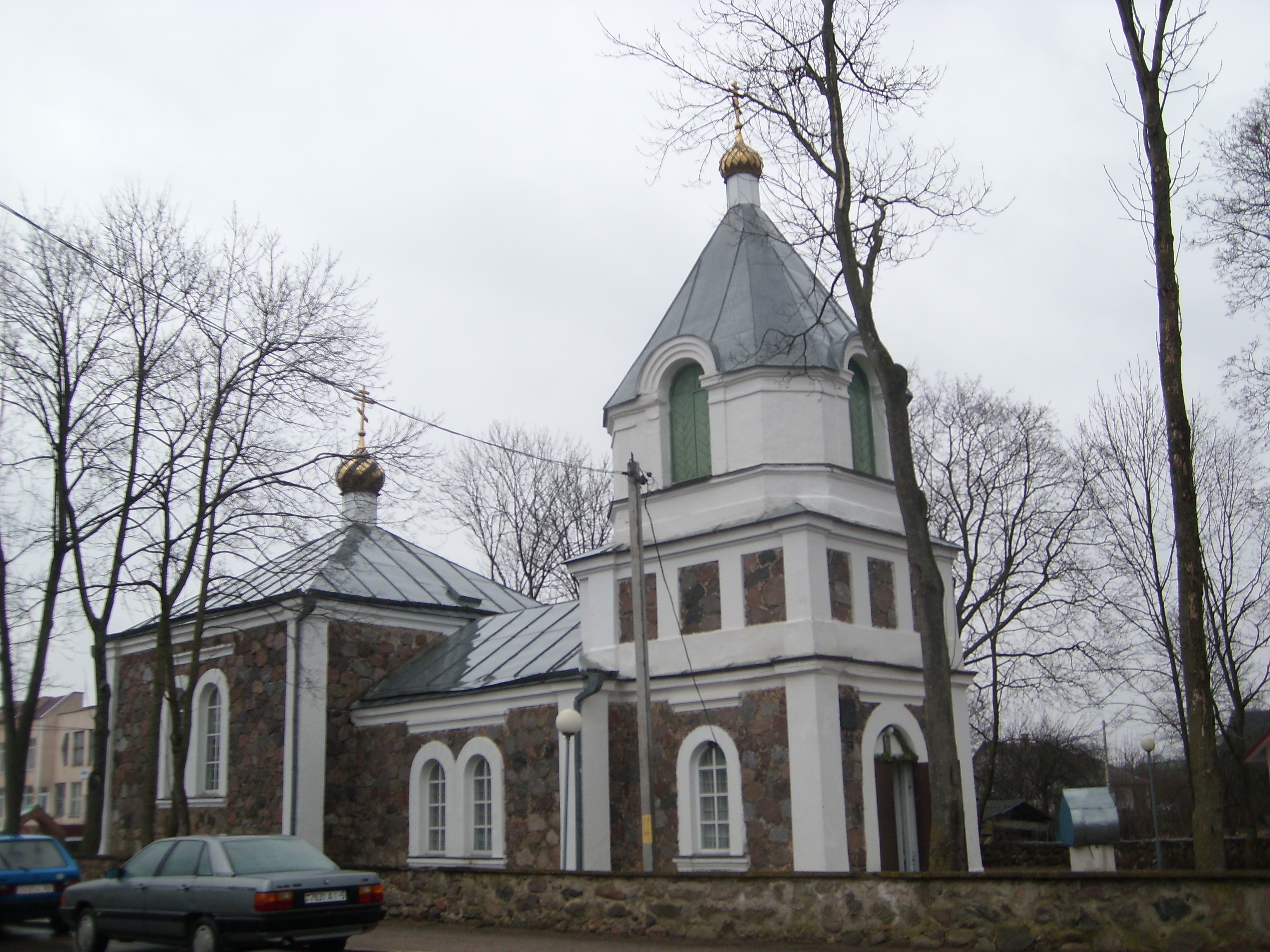 Беларуская (тарашкевіца): Ільлінская царква. в. Нарач This is a photo of Belarusian heritage monument. Reference number: 613Г000444 ( WLM)